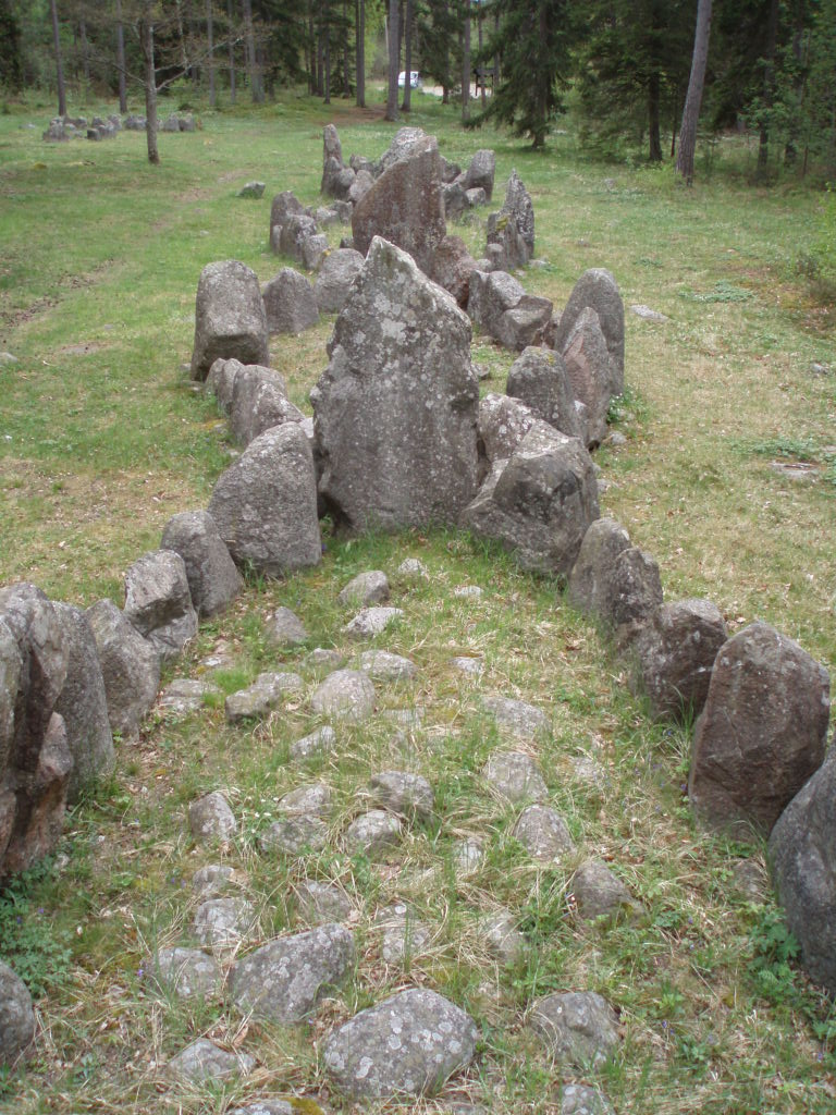 Vy av stenskeppen från ovan.